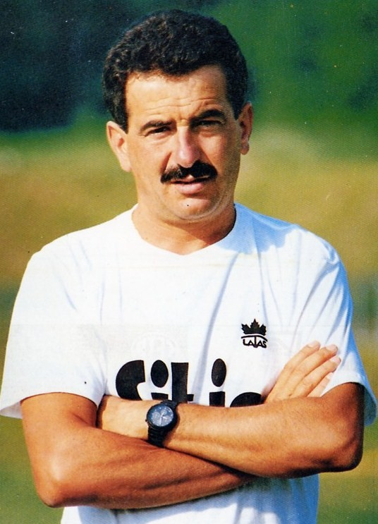 Foto del allenatore Emiliano Mondonico con la maglia dell’Atalanta